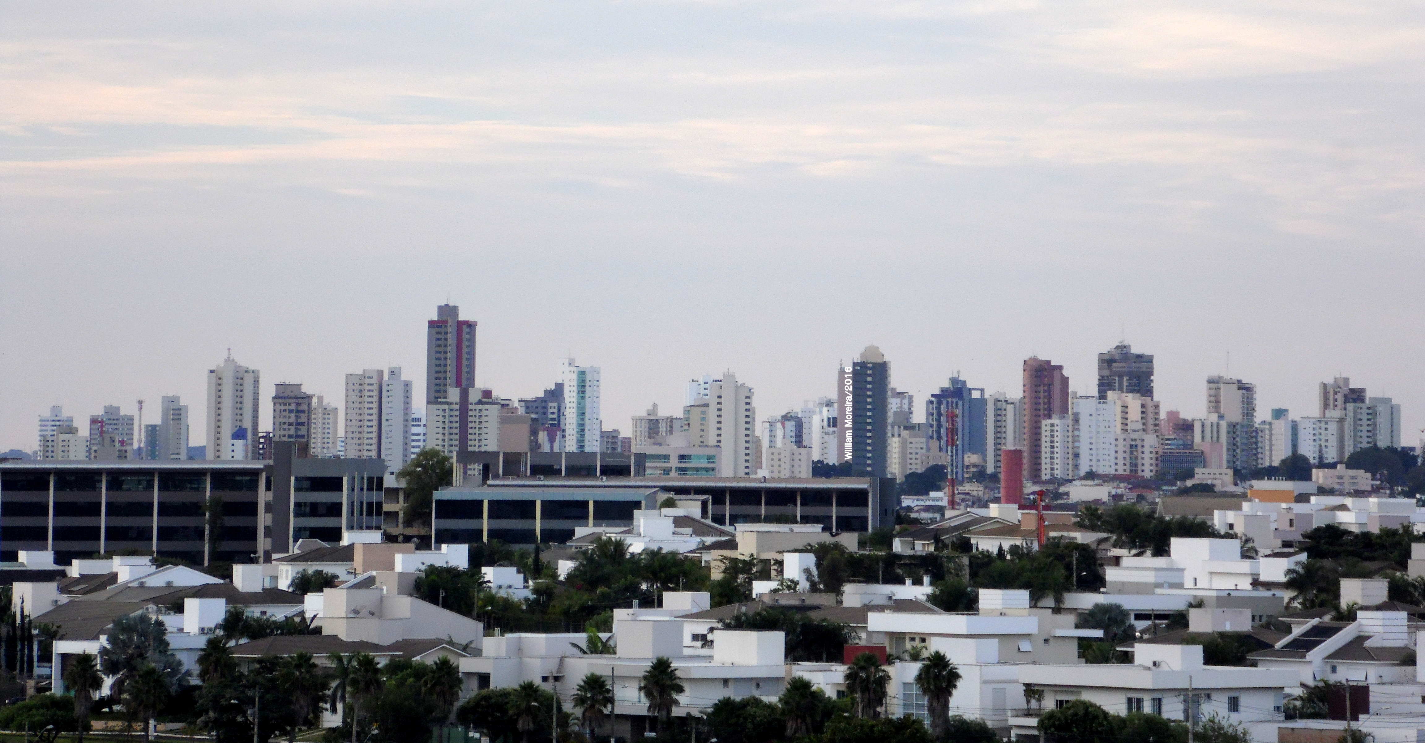 Outro ângulo da região central e parte da zona sul, vistas do terraço do Uberlândia Shopping.